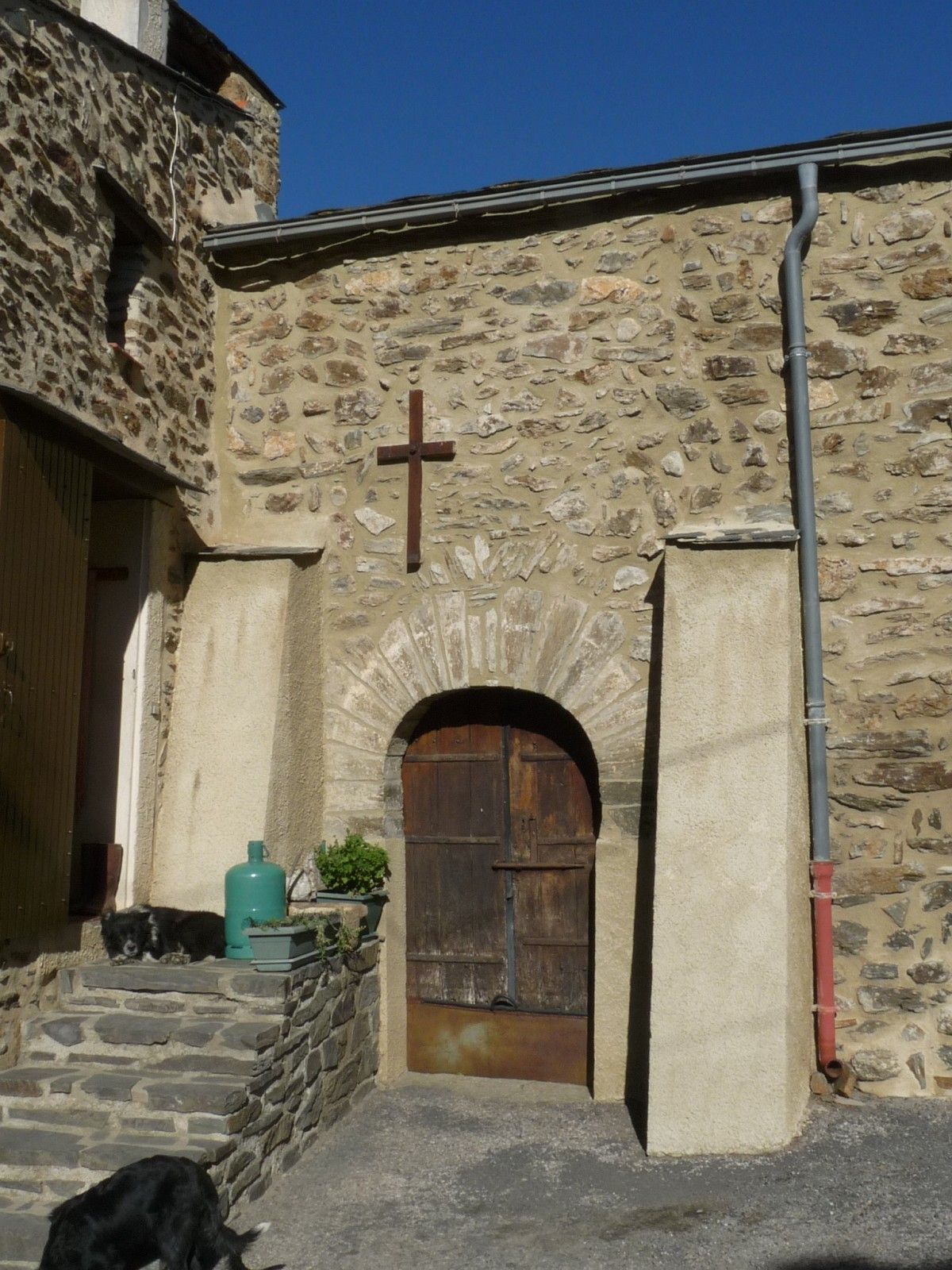 Eglise de Marians, Souanyas, Pyrénées-Orientales, France